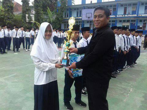 Juara Marawis se-Kabupaten